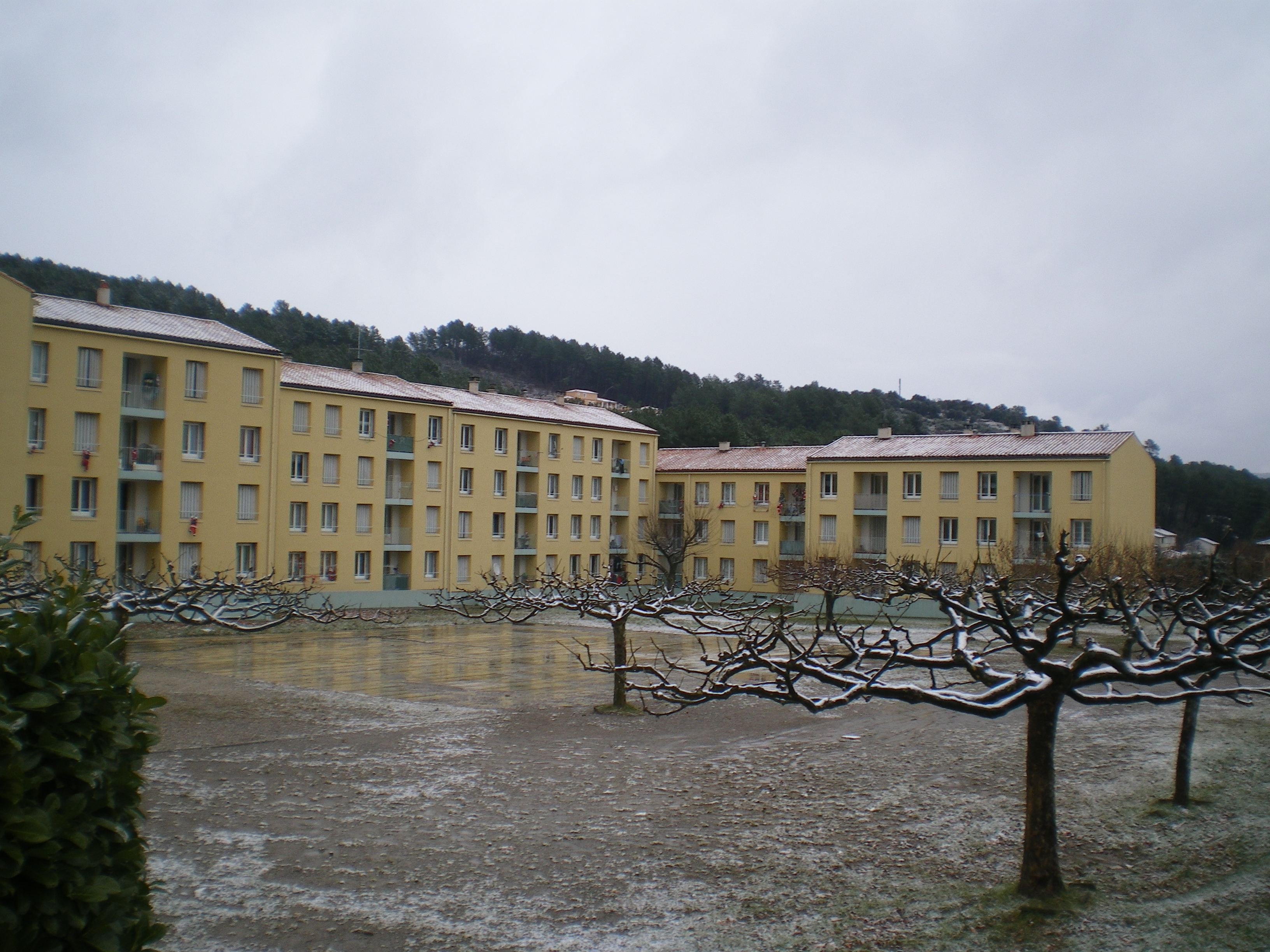 Les HLMs de Branoux-les-Taillades sobrement décorés pour Noël.